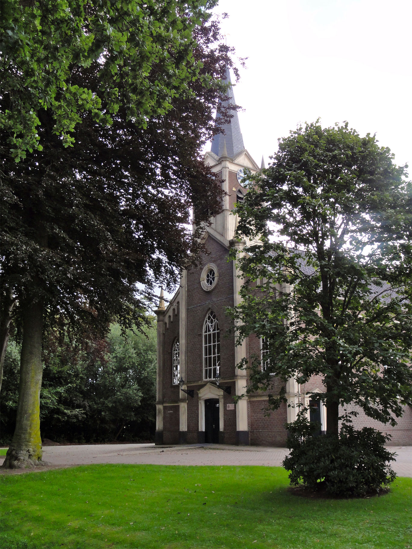 Hervormde kerk Torenlaan 12 It_Heechsan